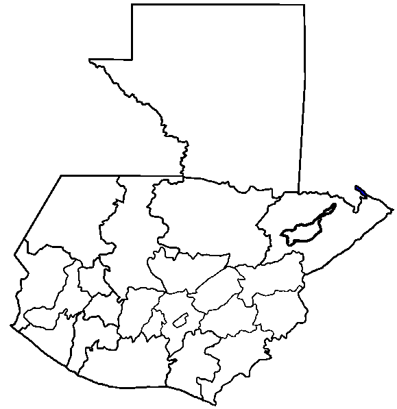 Mapa electoral Guatemala